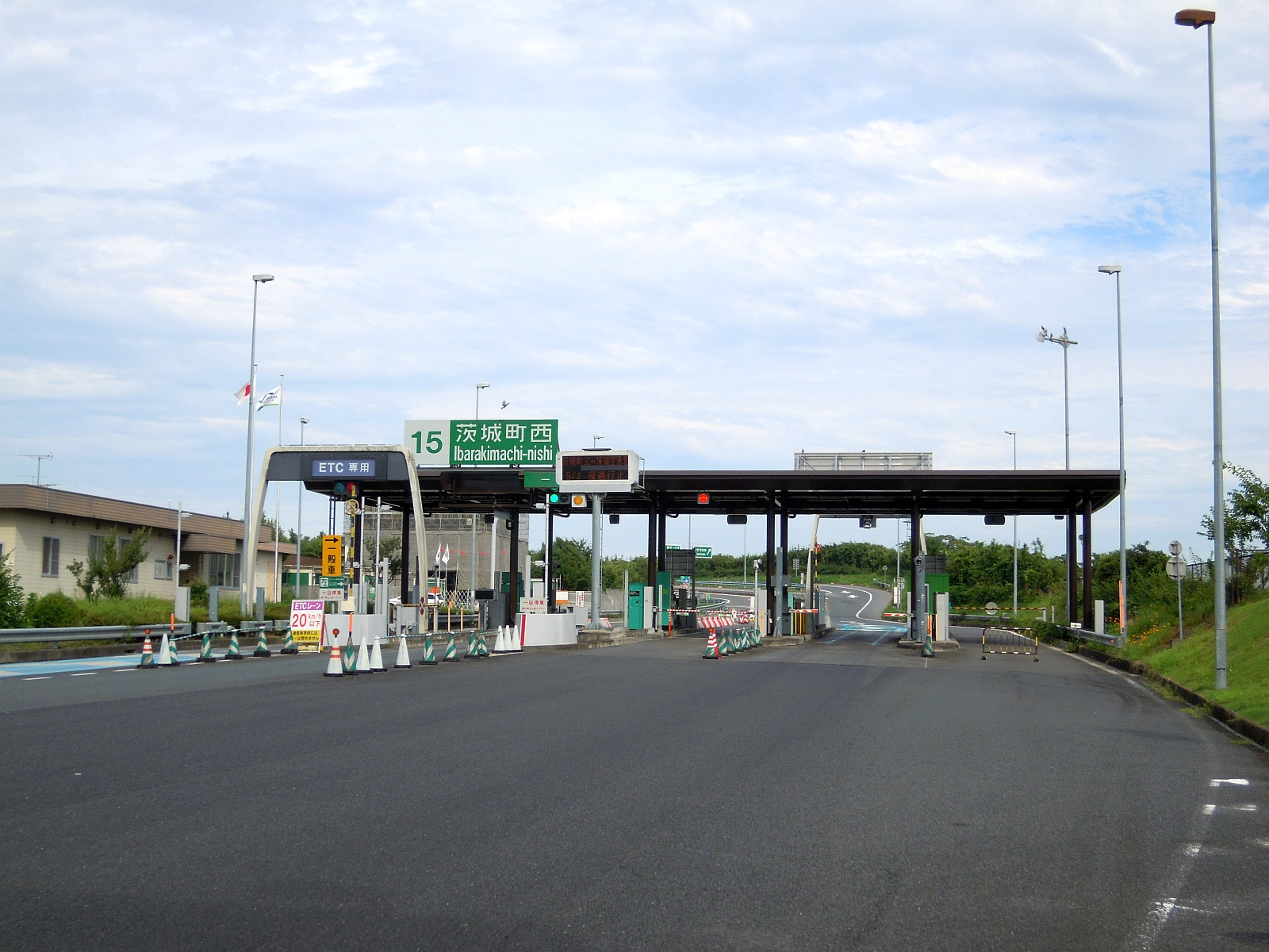 茨城県東茨城郡茨城町にある北関東自動車道の茨城町西インターチェンジ料金所を一般道側から。